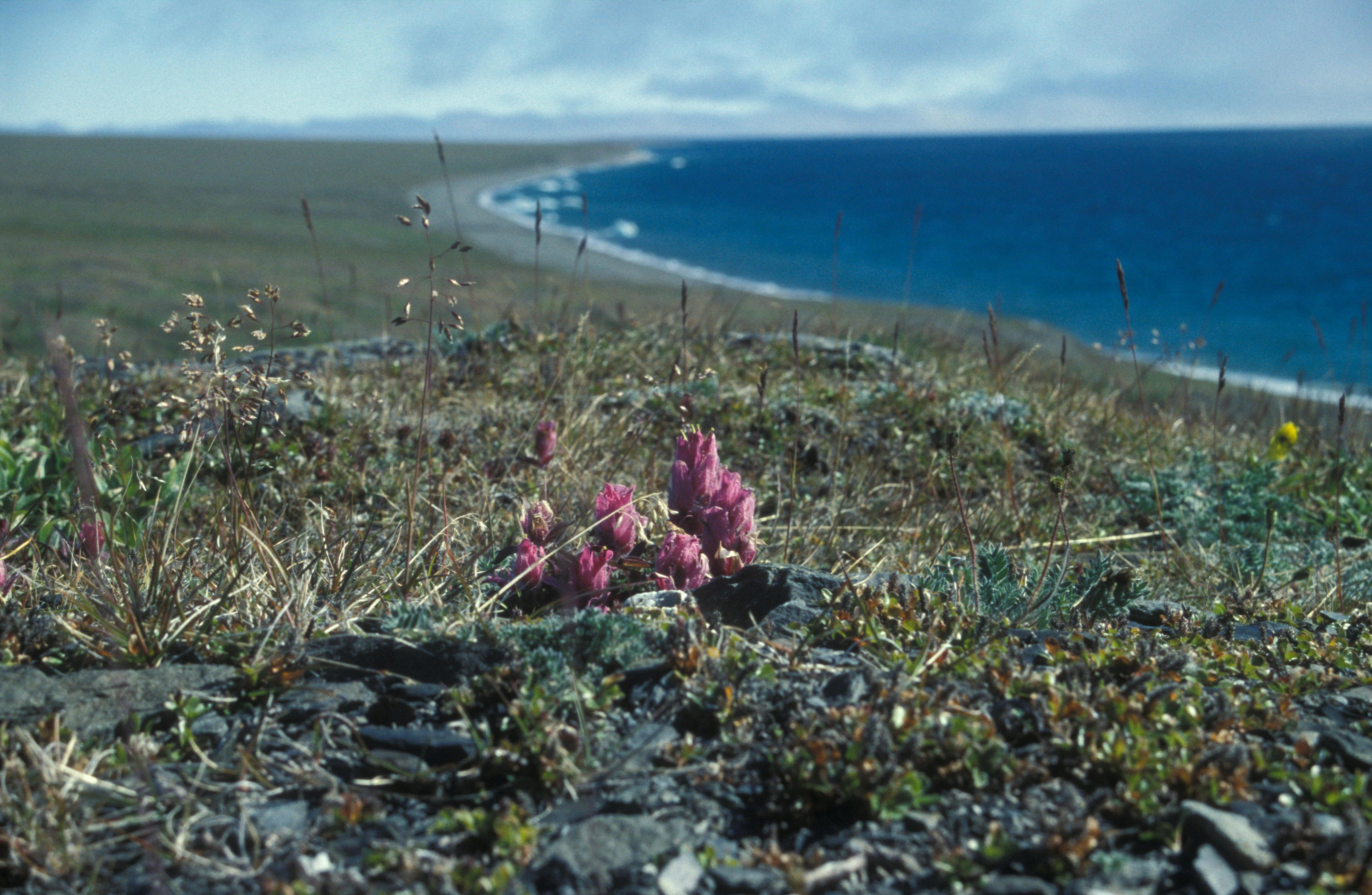 Остров Врангеля, Иультинский район This image is related to the protected area of Russia number 8700024